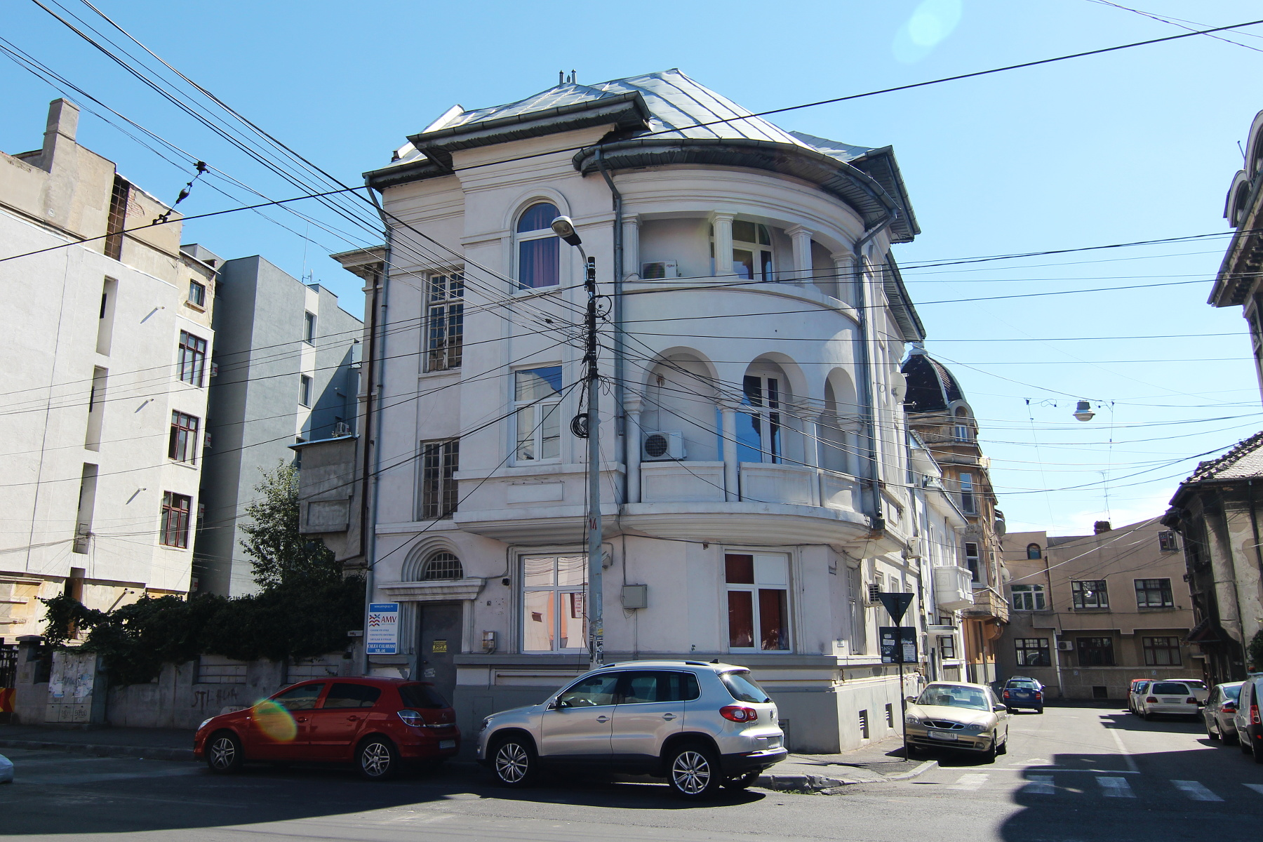 Imobil pe Calea Călărașilor